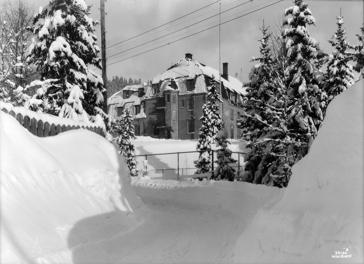 Vettakollen turisthotell, skog, snø.